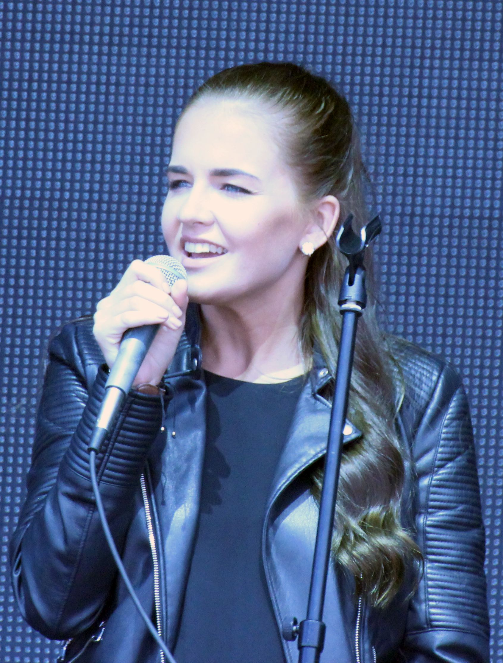 Gertu Pabbo esinemas Tallinna Merepäevadel